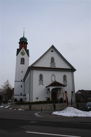 D katholisch Chile vo Boiel, Aargau, Schwiiz